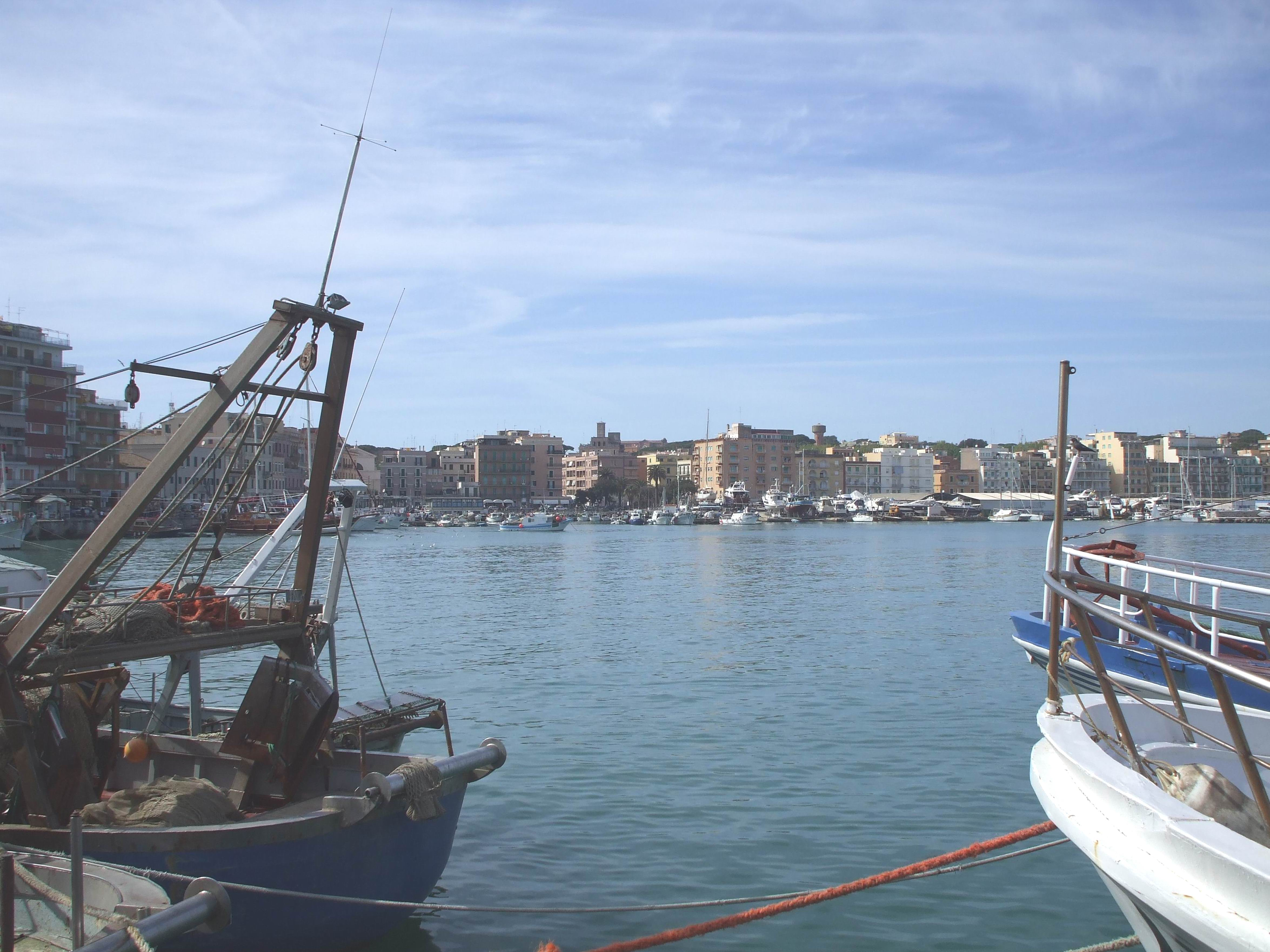 Anzio